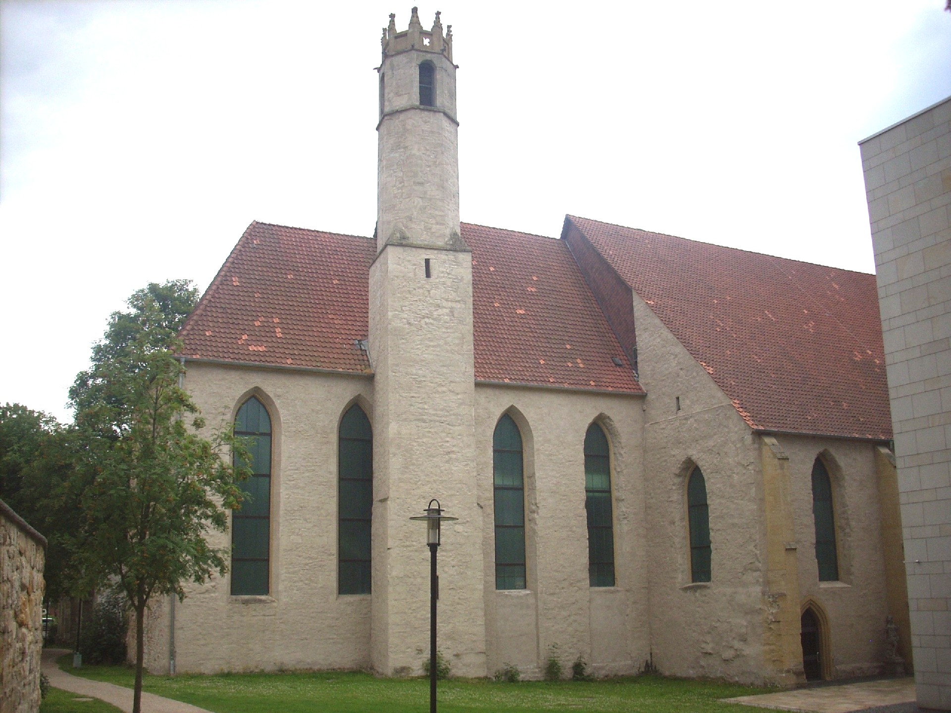 Ehem. Franziskanerkirche St. Martini, Chor und Turm